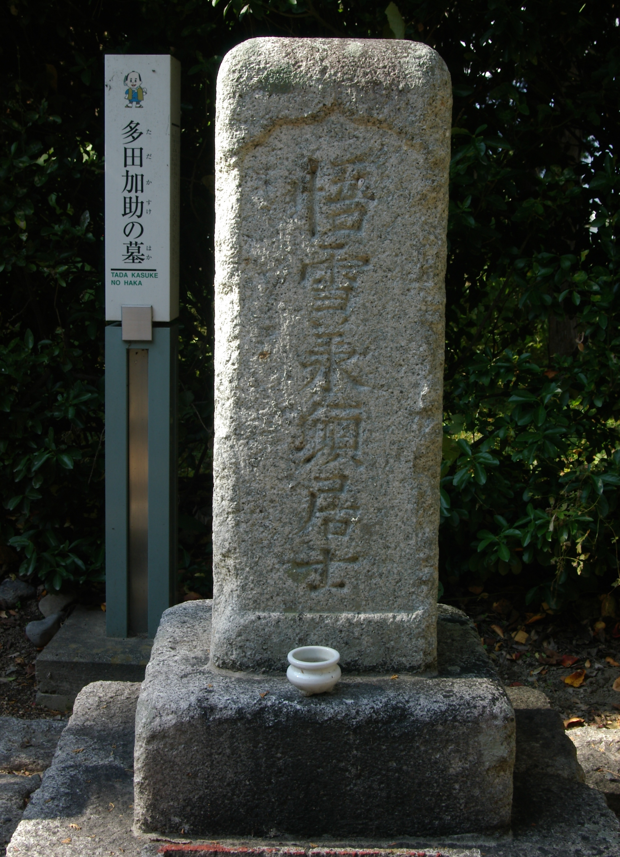 1686年の貞享騒動で処刑された28人の主格多田加助の墓石。貞享義民社の境内にあって11/1に全国義民顕彰集会がこの地であり、参拝して写真撮影した。